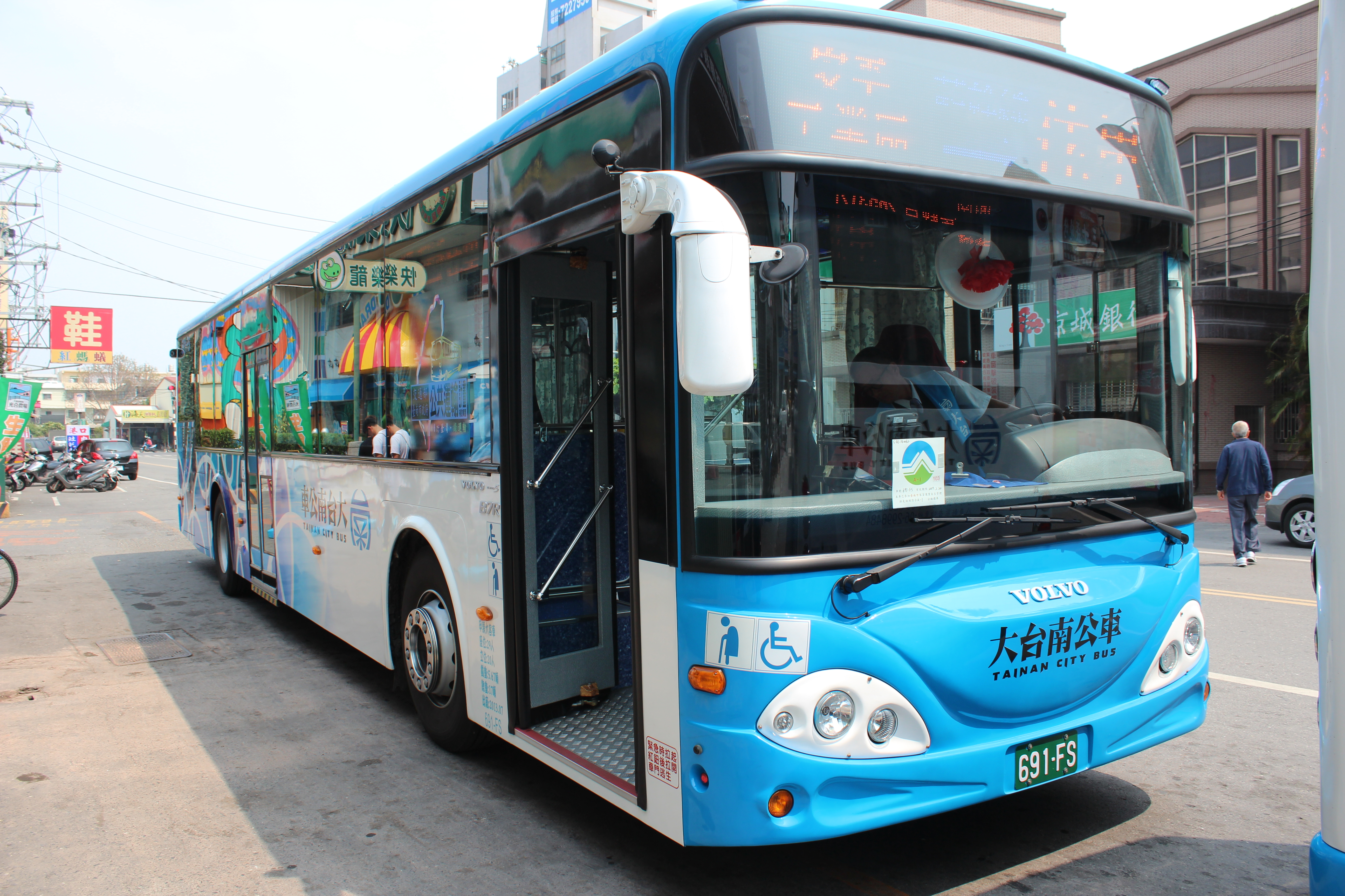 興南客運2013年VOLVO B7R大客車691-FS行駛大台南公車藍幹線。車體由大吉車體打造。